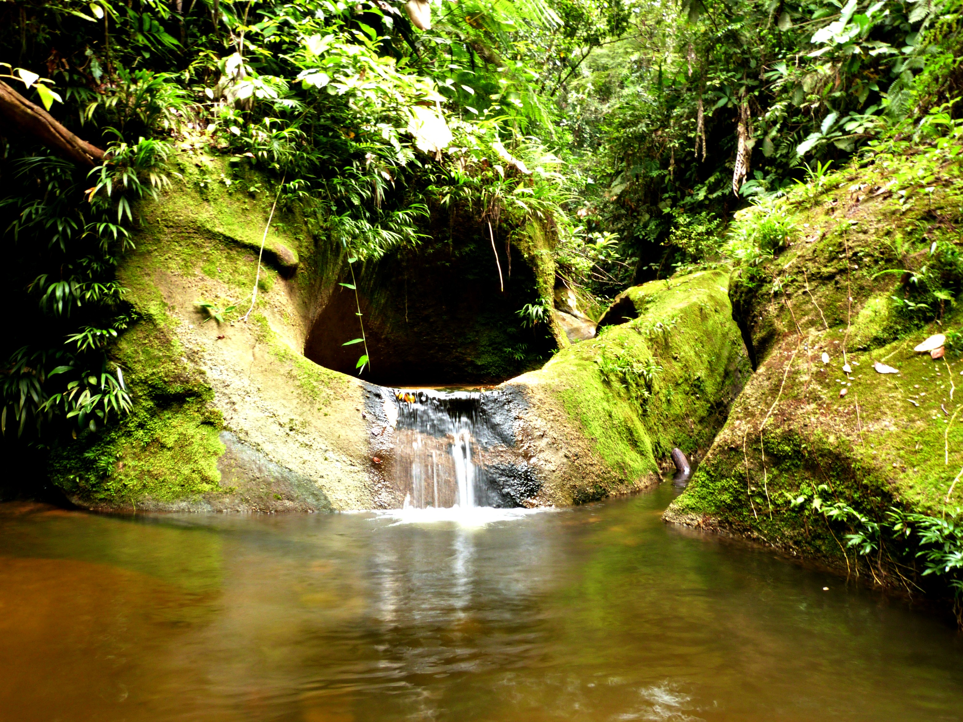 Poso Barinas